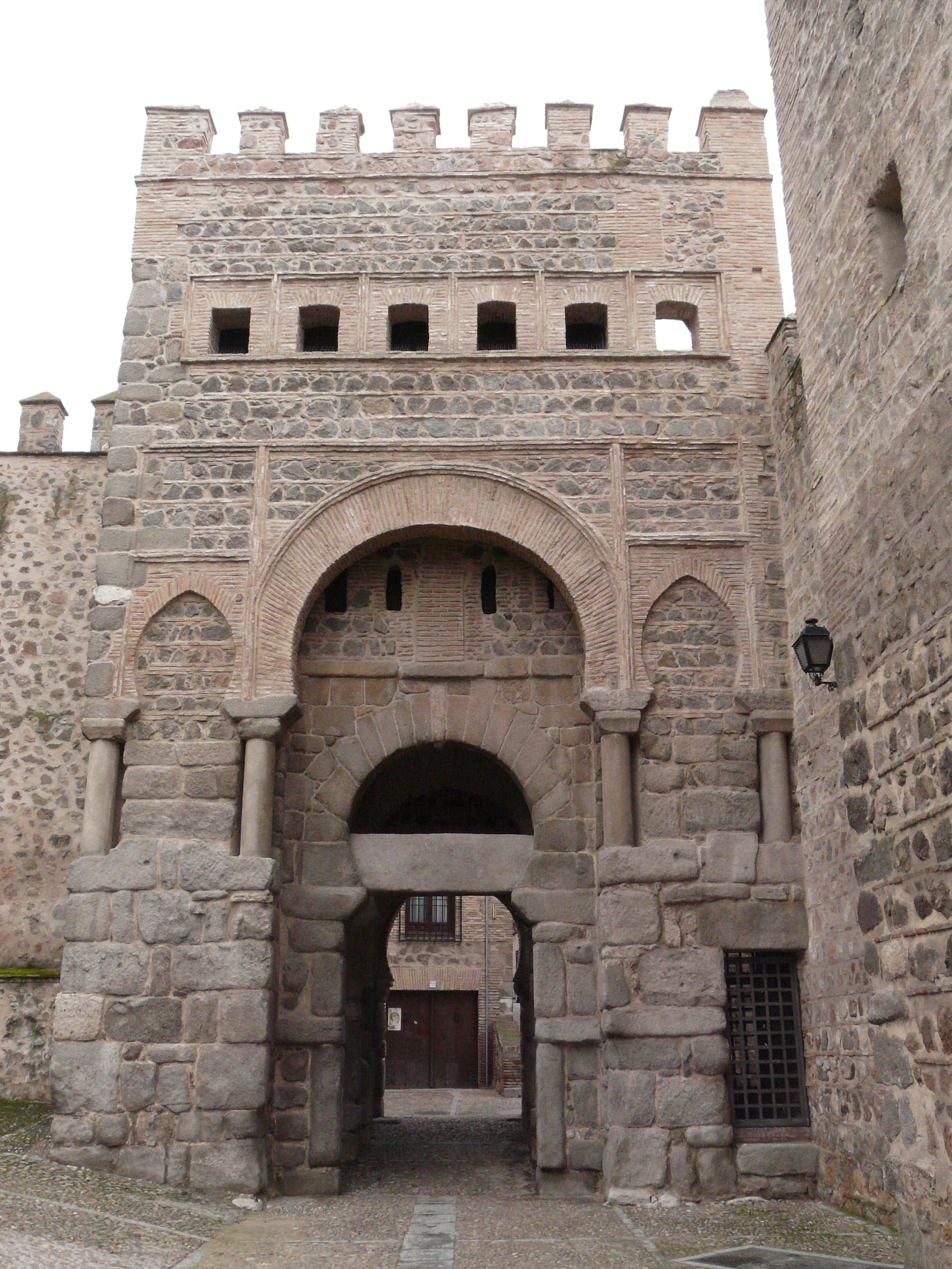 Puerta Vieja de Bisagra, Toledo (Spain)